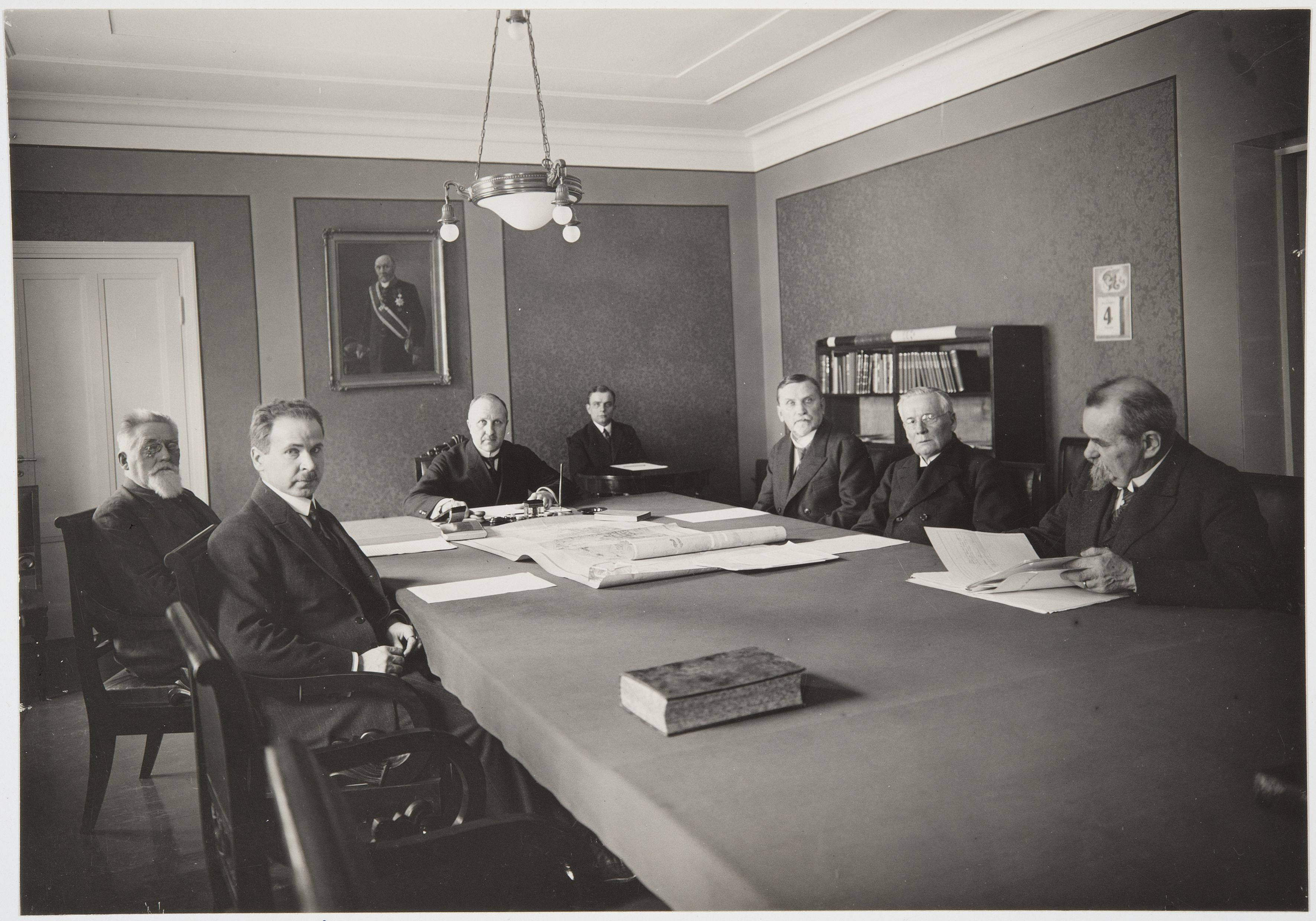 Maanmittaushallituksen kokous. Vasemmalla edessä Väinö Ahla, hänen takanaan Walter Nohrström ja pöydän päässä Kyösti Haataja.